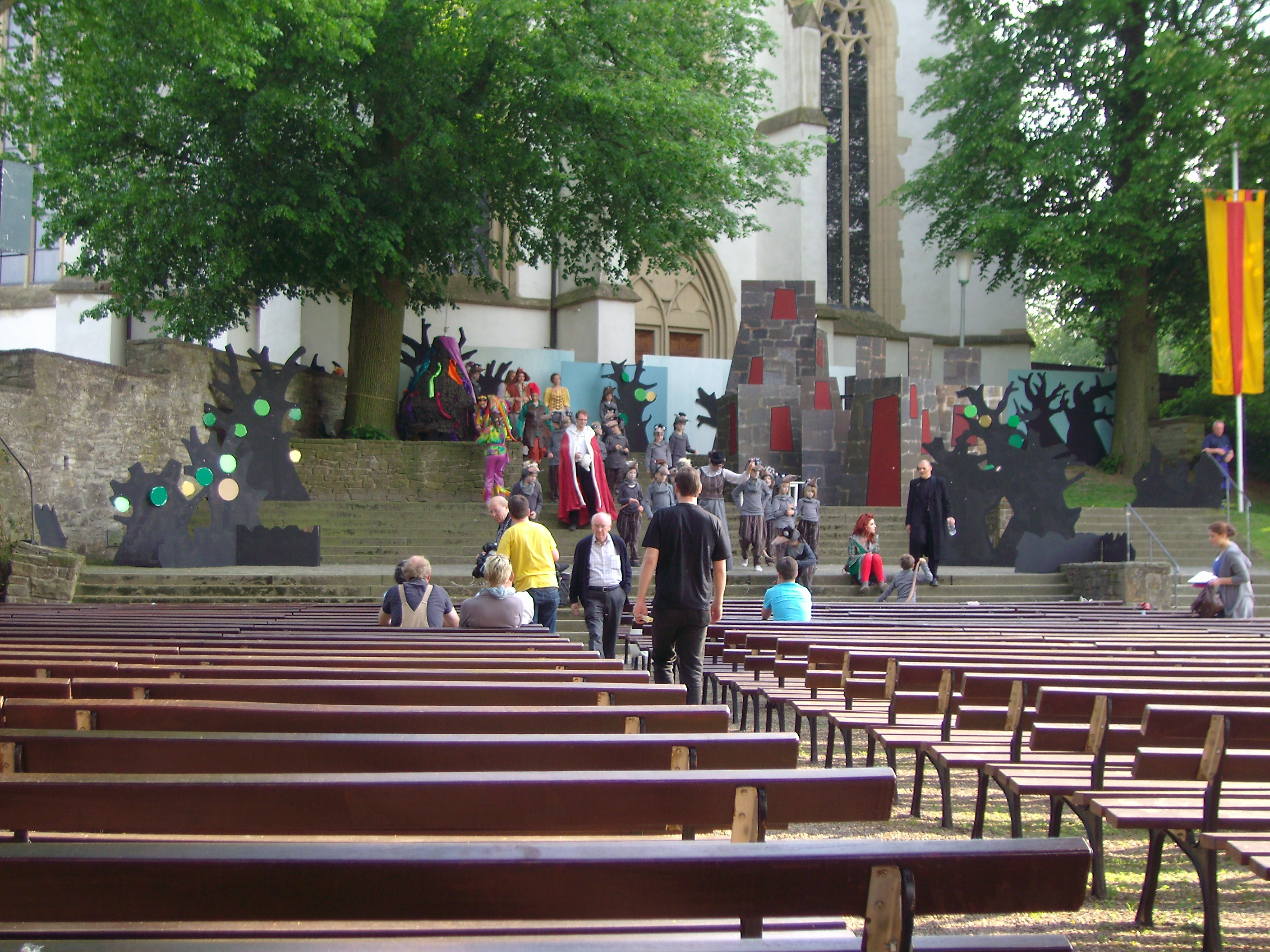 Proben auf der Burgbühne, der gestiefelte Karter